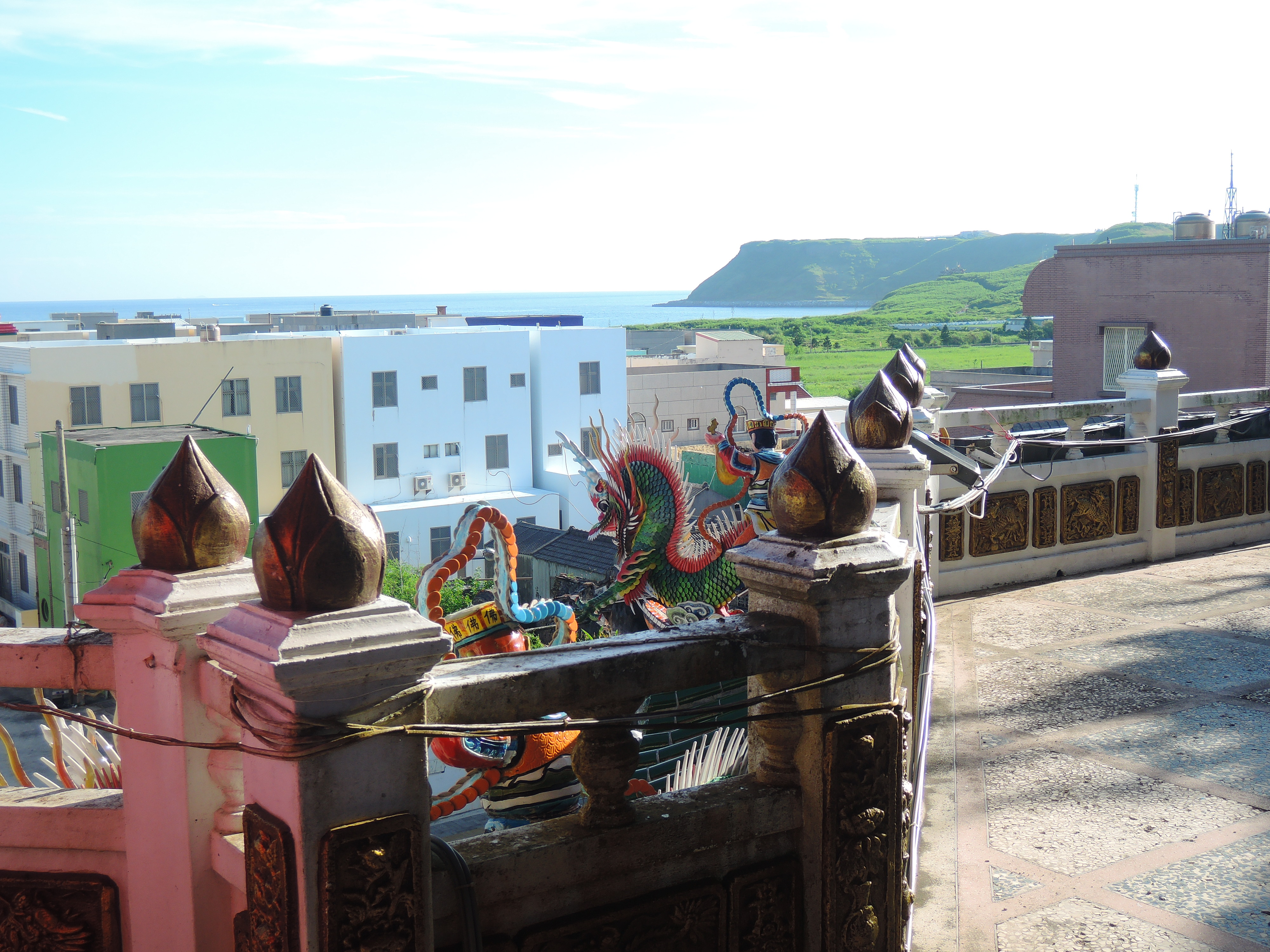 西嶼鄉內垵村228號